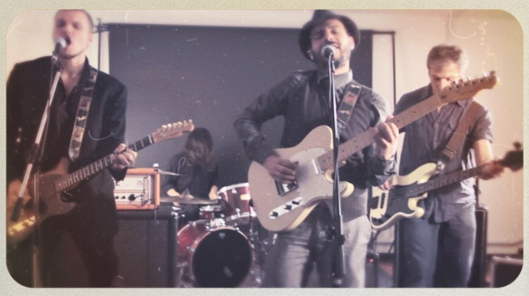 Door selcted m